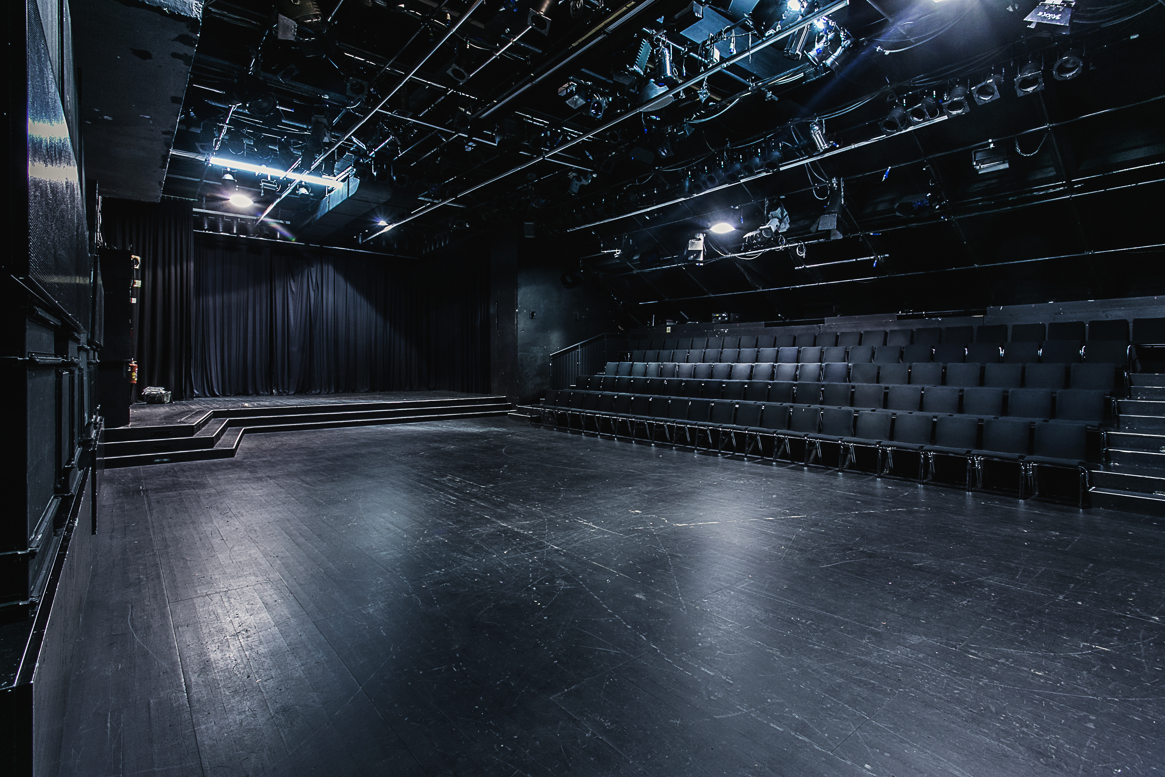 Schauspielhaus Graz - HAUS ZWEI